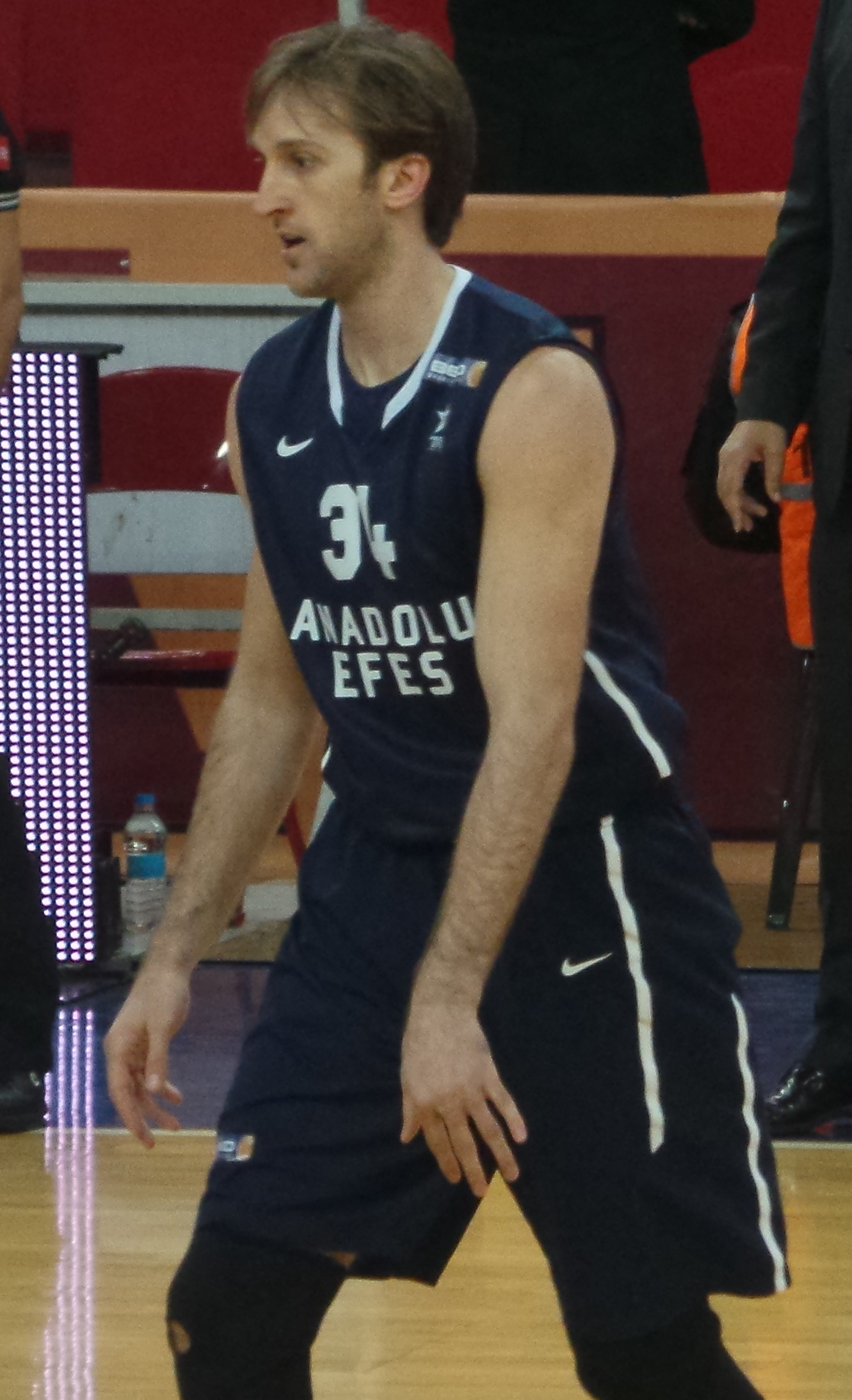 Zoran Planinić